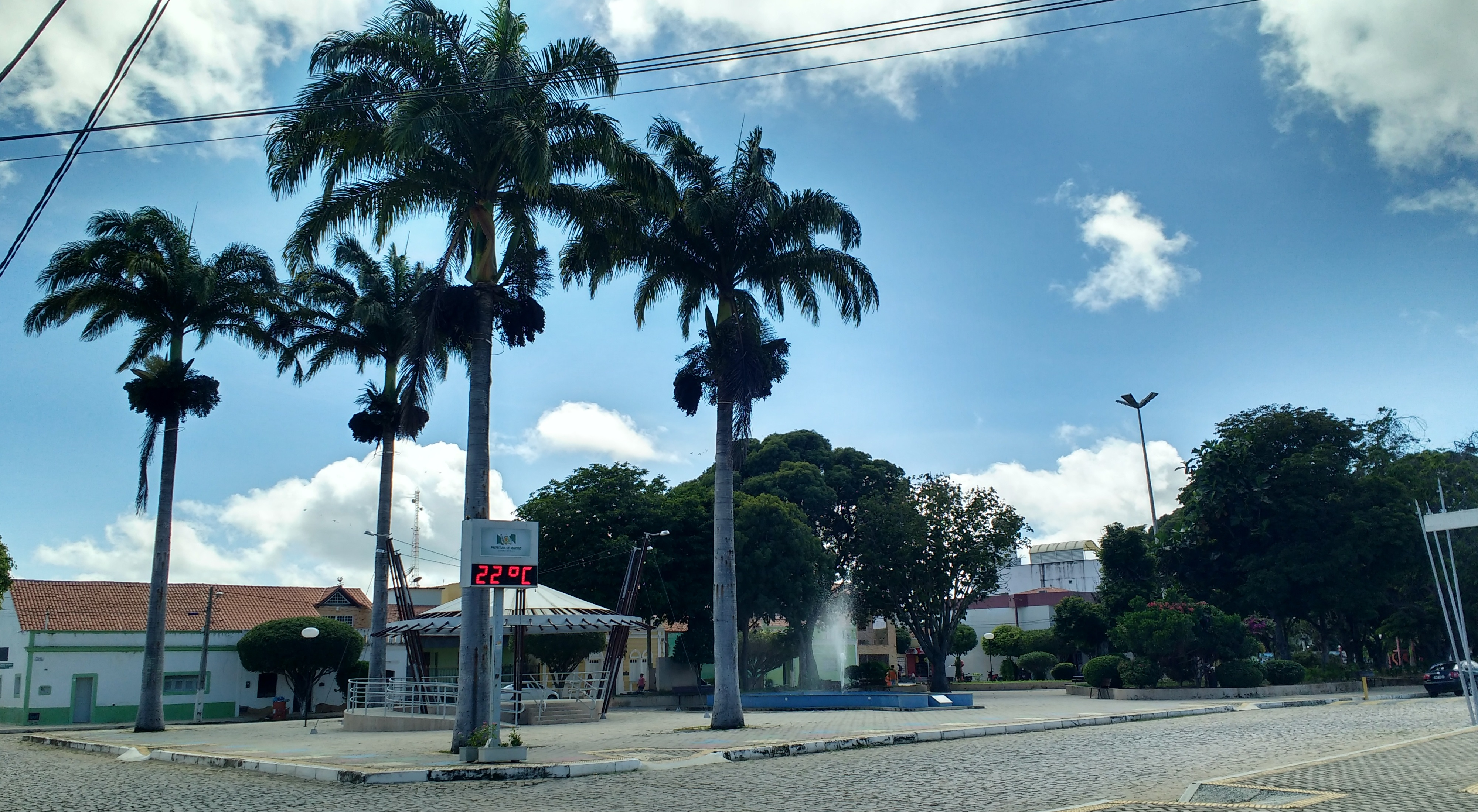 Praça Almino Afonso em Martins, Rio Grande do Norte (Brasil)